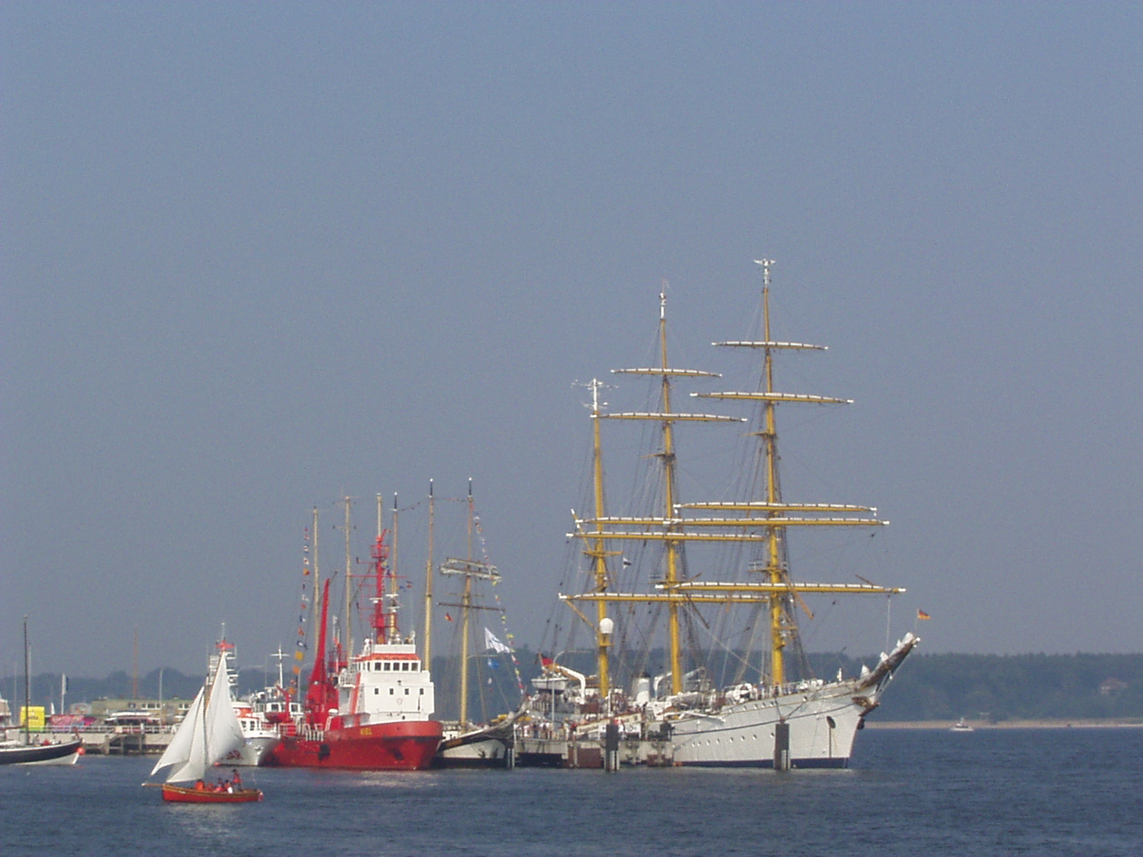 Gorch Fock an der Blücherbrücke (daneben das Feuerlöschschiff 'Kiel')